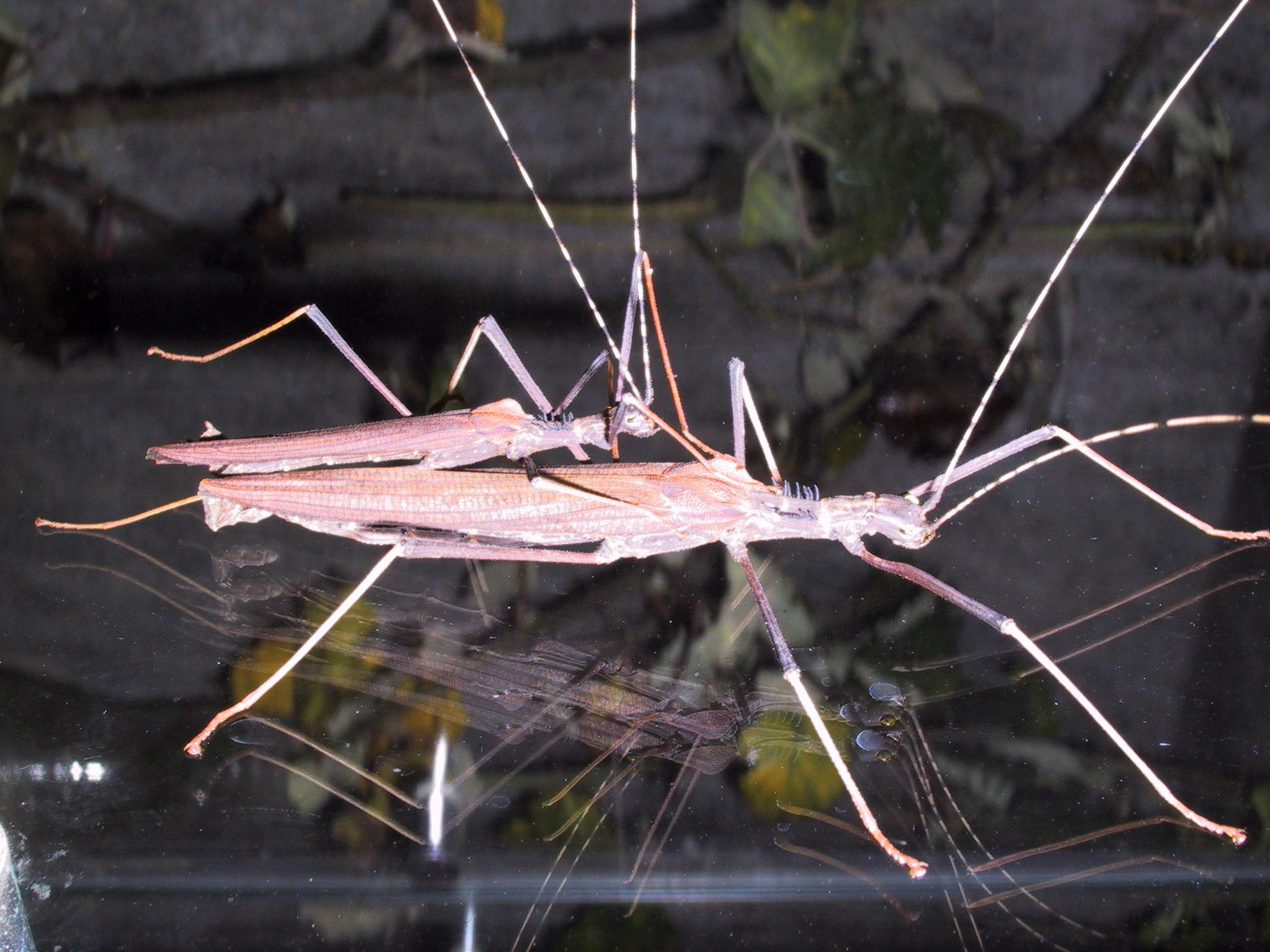 Pseudophasma acanthonota